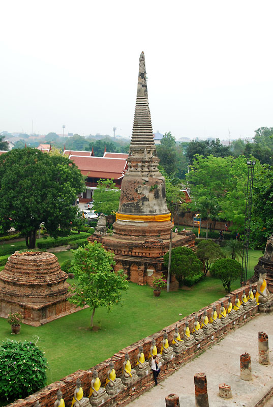 Wat Yai Chai Mongkhon in Ayutthaya, Thailand